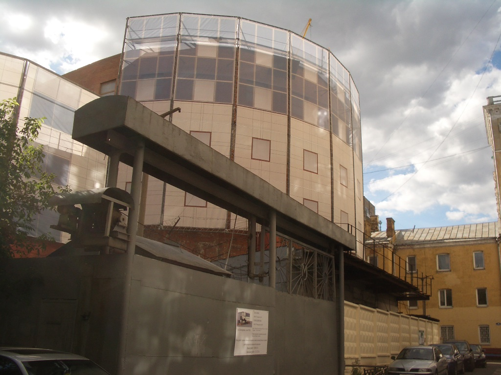 Оголовок запасного выхода Таганского ЗКП